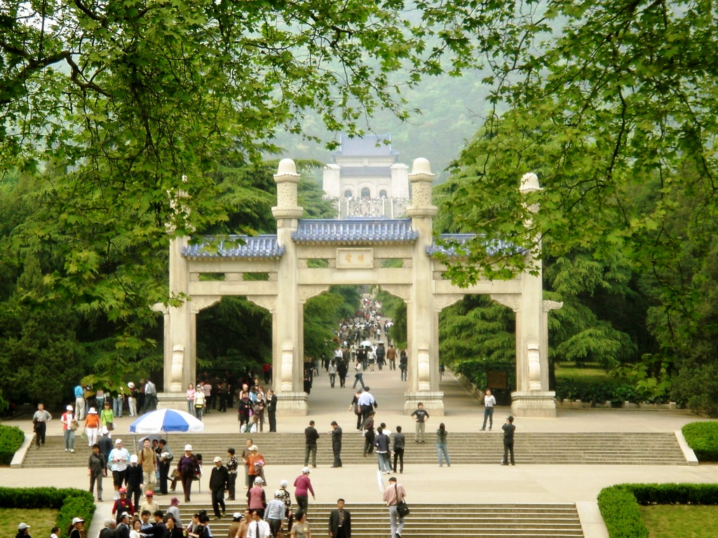 南京中山陵，远眺博爱坊和祭堂